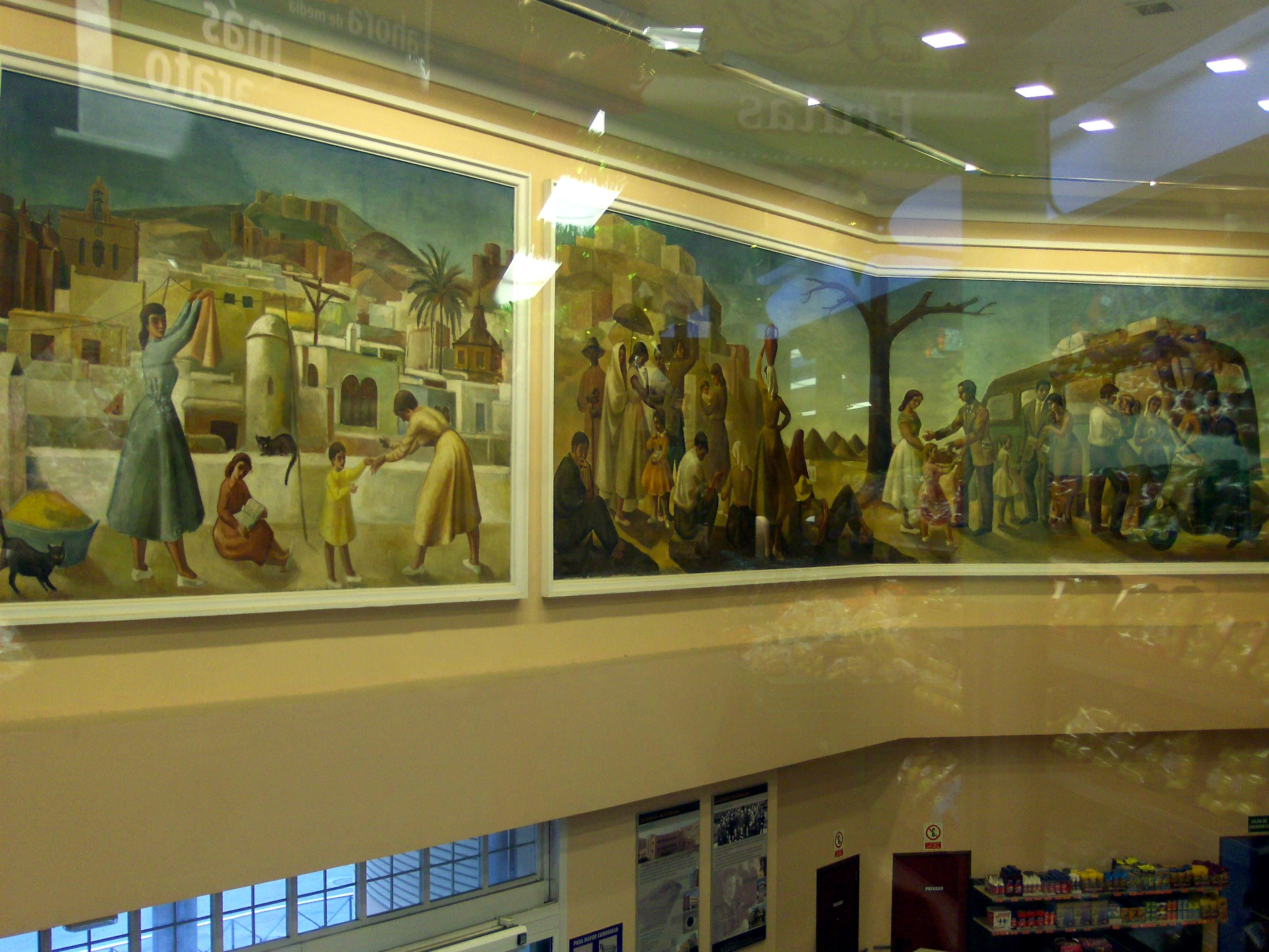 Frescos en el interior de la antigua estación de autobuses de Almería, siendo hoy un supermercado Mercadona